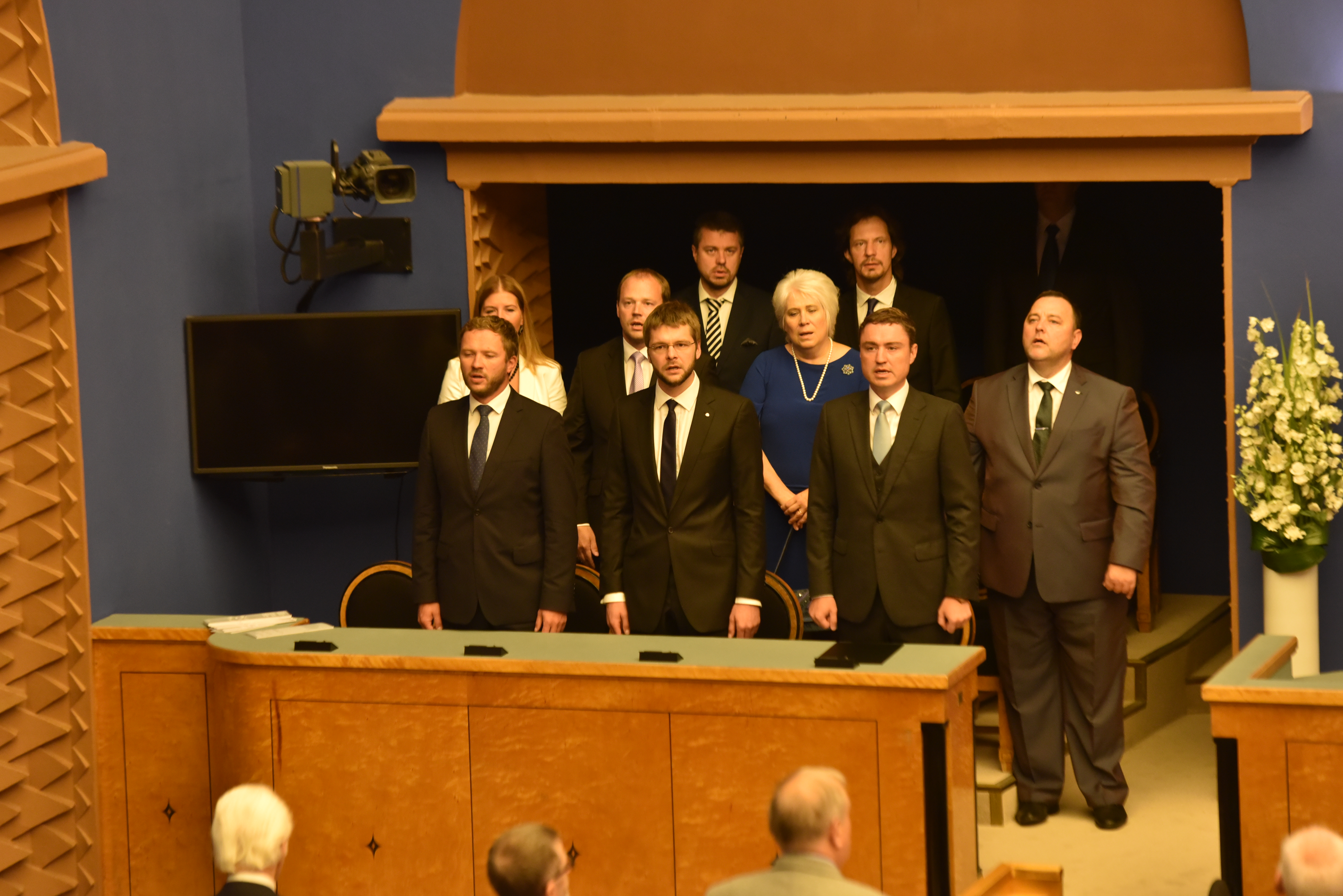 Saeimas priekšsēdētāja Ināra Mūrniece Igaunijas galvaspilsētā Tallinā piedalās svinīgajos pasākumos par godu Igaunijas neatkarības atjaunošanas 25.gadadienai. 20.augusta kluba un Igaunijas parlamenta svinīgā sēde.